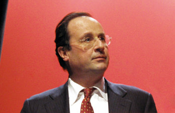 Photo de François Hollande, Premier Secrétaire du Parti socialiste (France). Prise le 29 janvier 2006, lors du 11e Rassemblement des Secrétaires de section du PS, à la Maison de la Mutualité à Paris. Auteur : Ludovic Lepeltier Lepeltier.ludovic